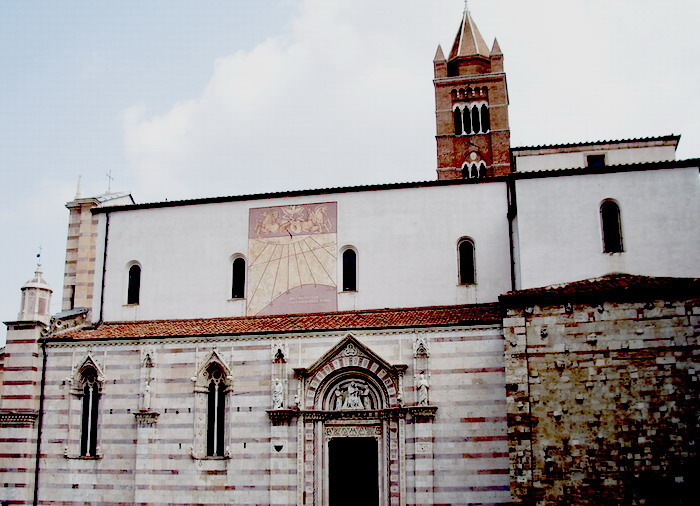 Lato sud del Duomo di Grosseto, Tuscany (Italy)